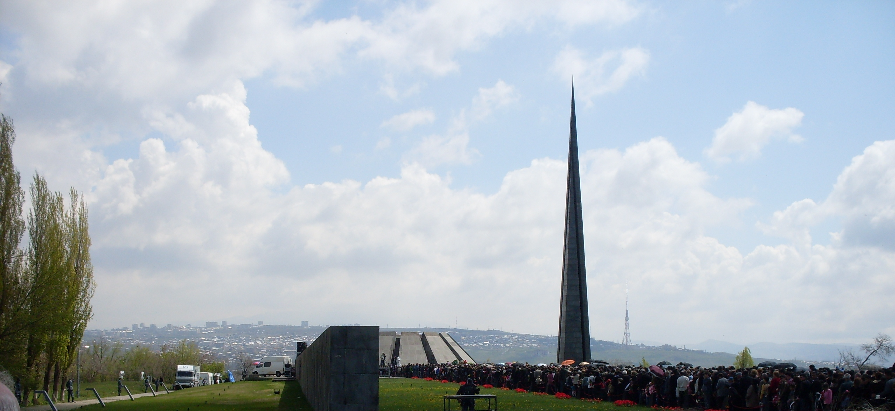 2009 год, 24 апреля, Цицернакаберд